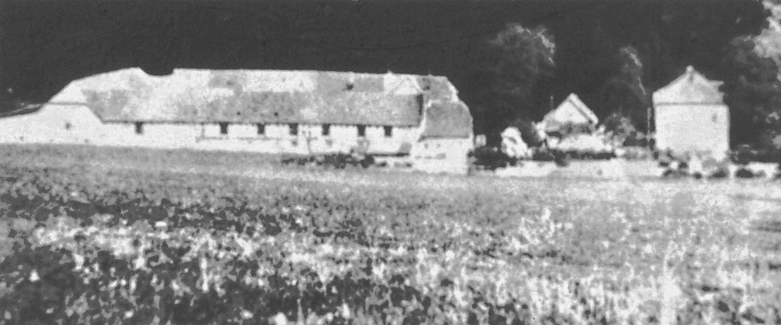 Kopie eines Fotos an der Infotafel zum Gehöft Heiligenroda.